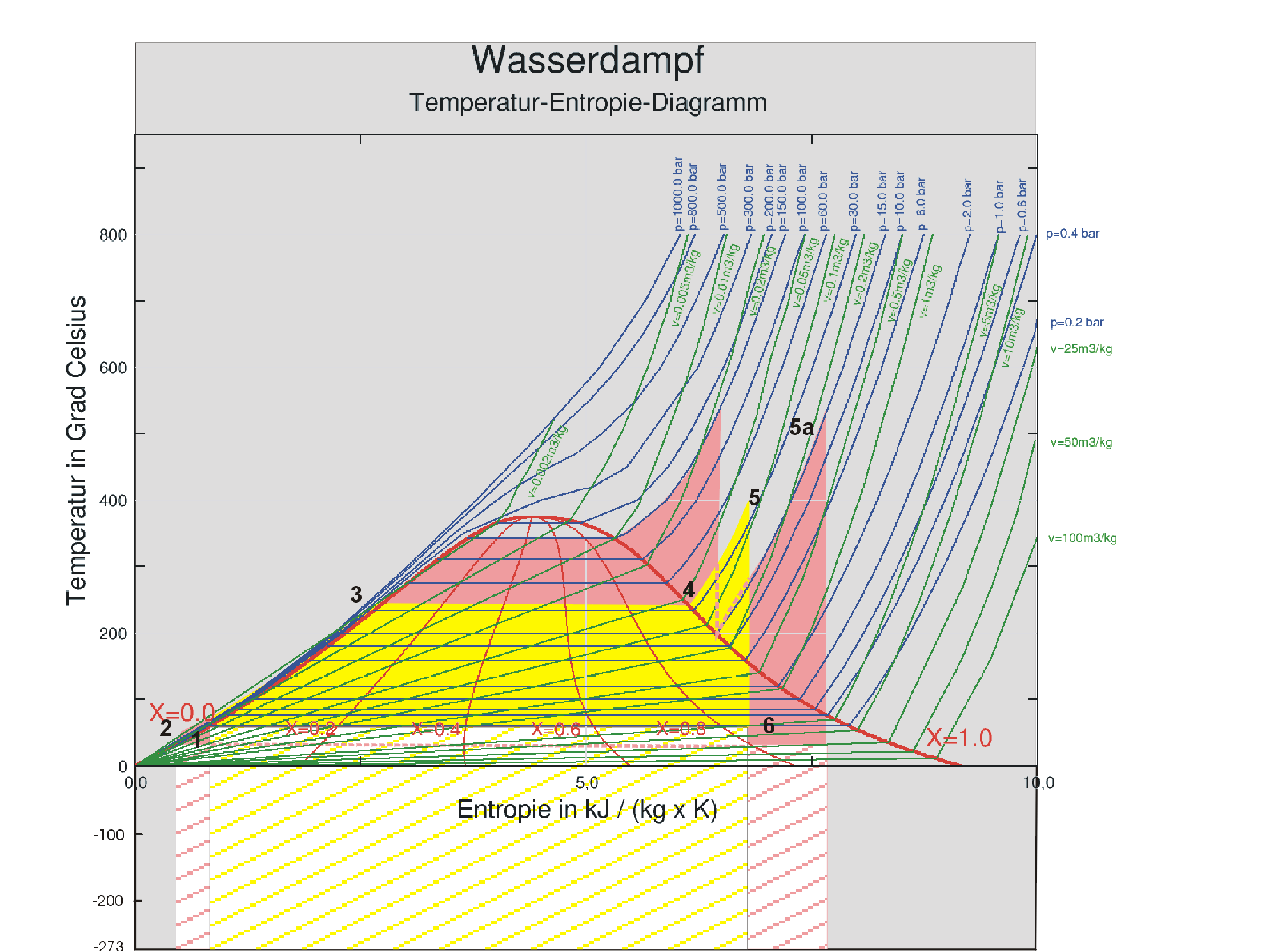 Unterschiedliche Kraftwerksschaltungen